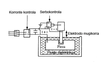 Elektroerosioa